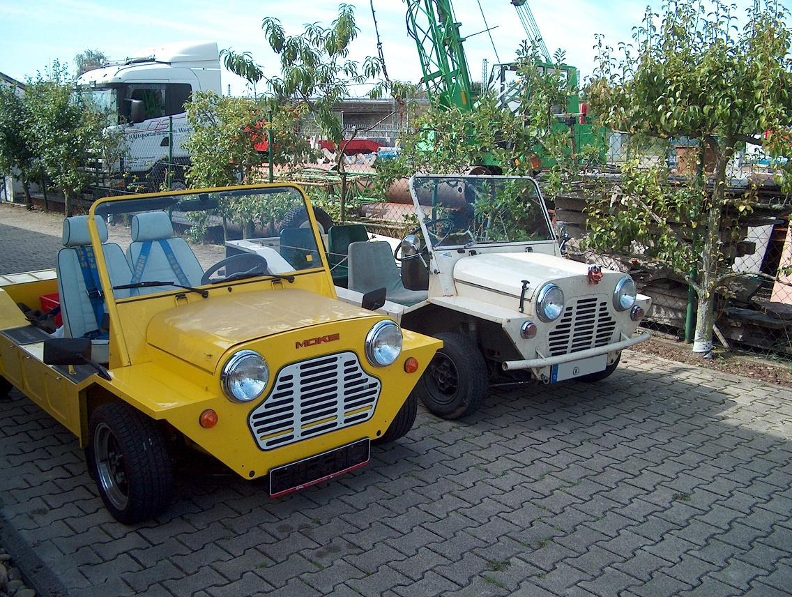 Mini Mokes 93 und 67